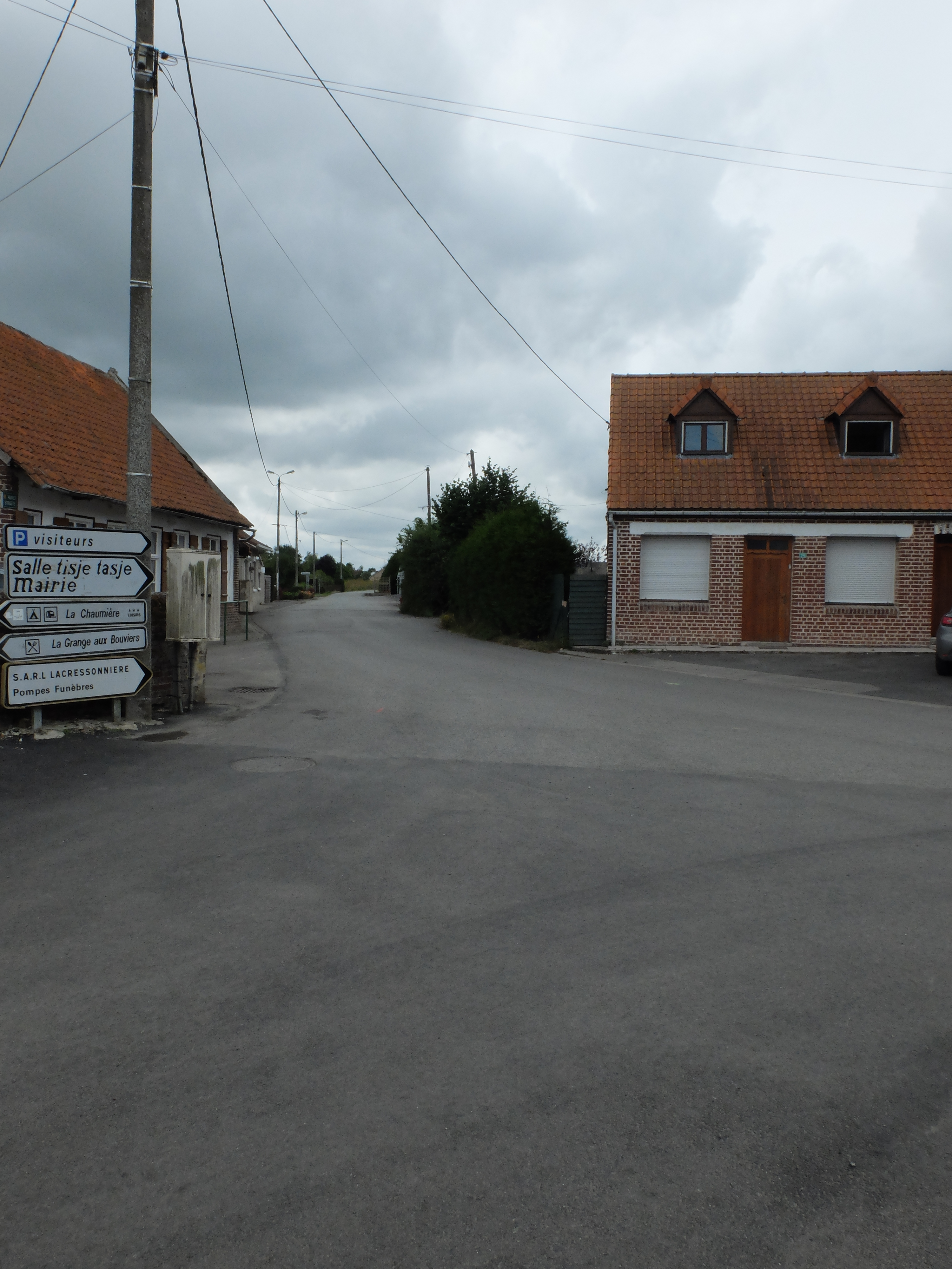 Vue d'une rue de Buysscheure.